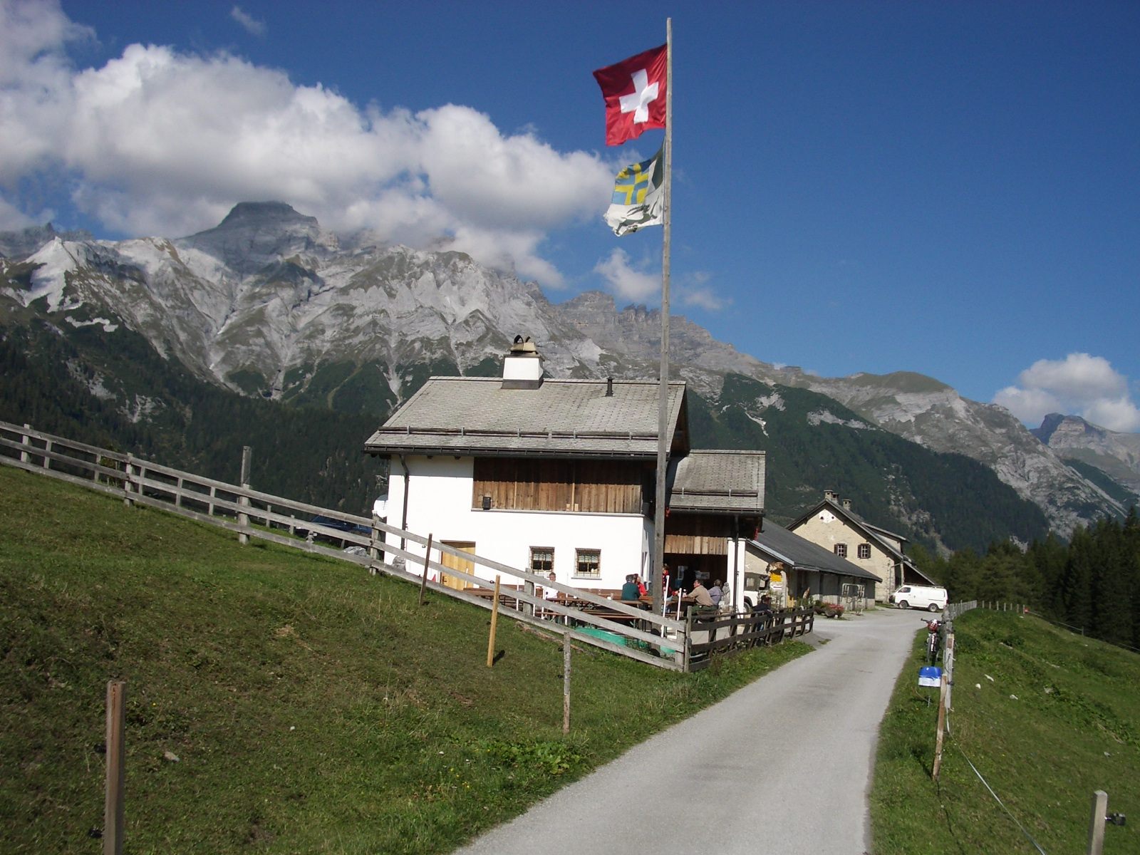 Kunkelspass GR, Switzerland self-made, September 2006